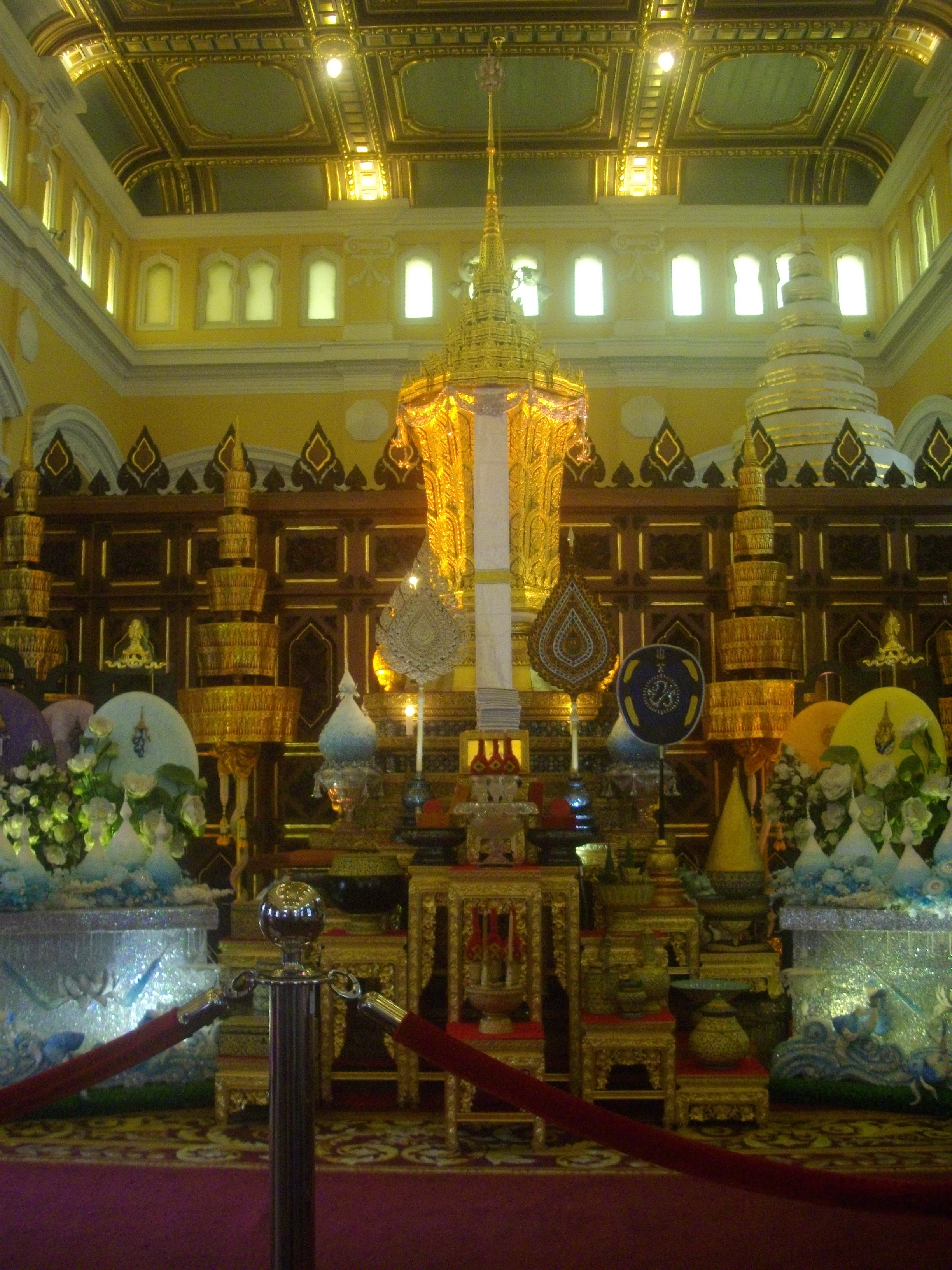 พระโกศกุดั่นใหญ่ประกอบพระเกียรติยศสมเด็จพระยานสังวร สมเด็จพระสังฆราช สกลมหาสังฆปริณายก ประดิษฐานภายใต้พระเศวตฉัตรสามชั้น ณ ตำหนักเพ็ชร วัดบวรนิเวศวิหาร บันทึกภาพเมื่อวันที่ 10 ธันวาคม พ.ศ. 2558